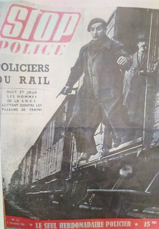 Hebdomadaire STOP POLICE, le seul hebdomadaire policier. N°21 du 5 Décembre 1945. Policier du Rail, nuit et jour les hommes de la S.N.C.F luttent contre les pilleurs de trains